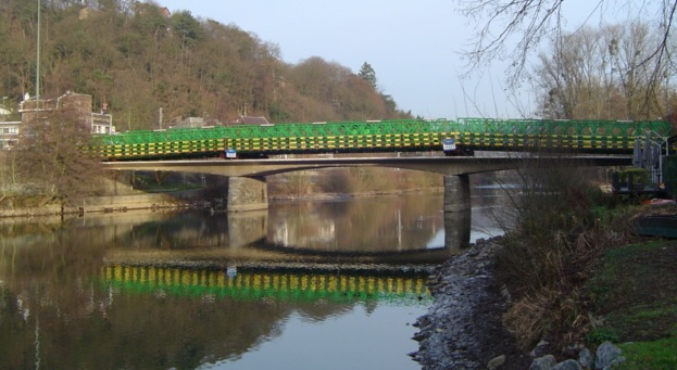 Photographie prise le 10 janvier 2006 (15h24) par Gnagnael (Gnagnael): Pont de Tilff surmonté d'un pont Bailey.